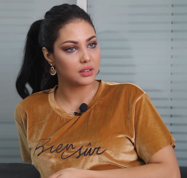 إبتسام تسكت : كيعجبني العدس بزاف و هاكيفاش كنطيب طاجين بالدجاج